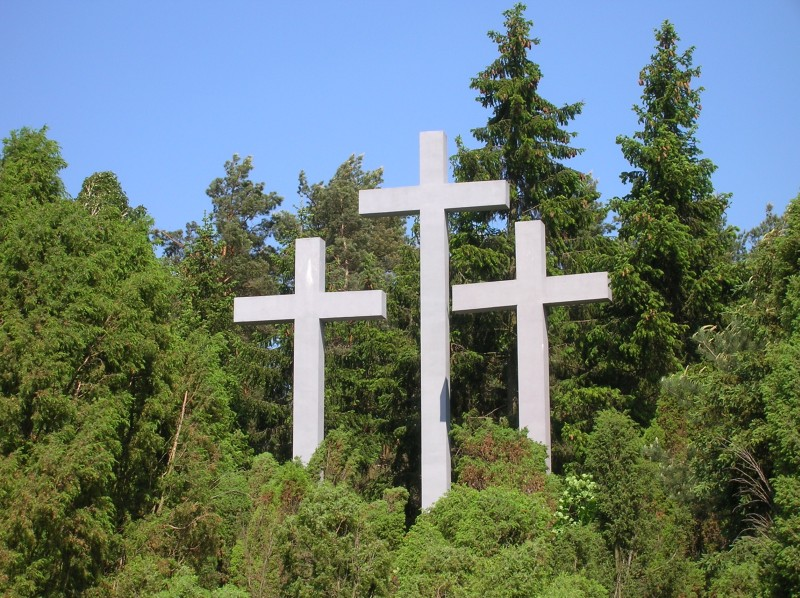 Palmiry